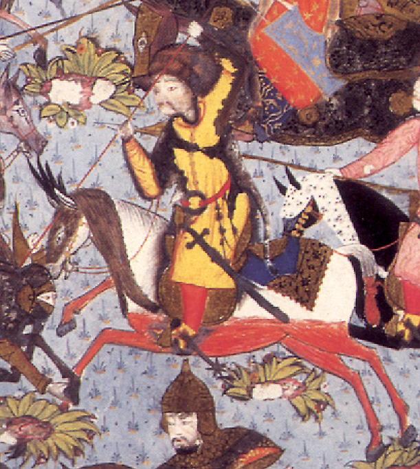 Detail of a miniature: Akıncı